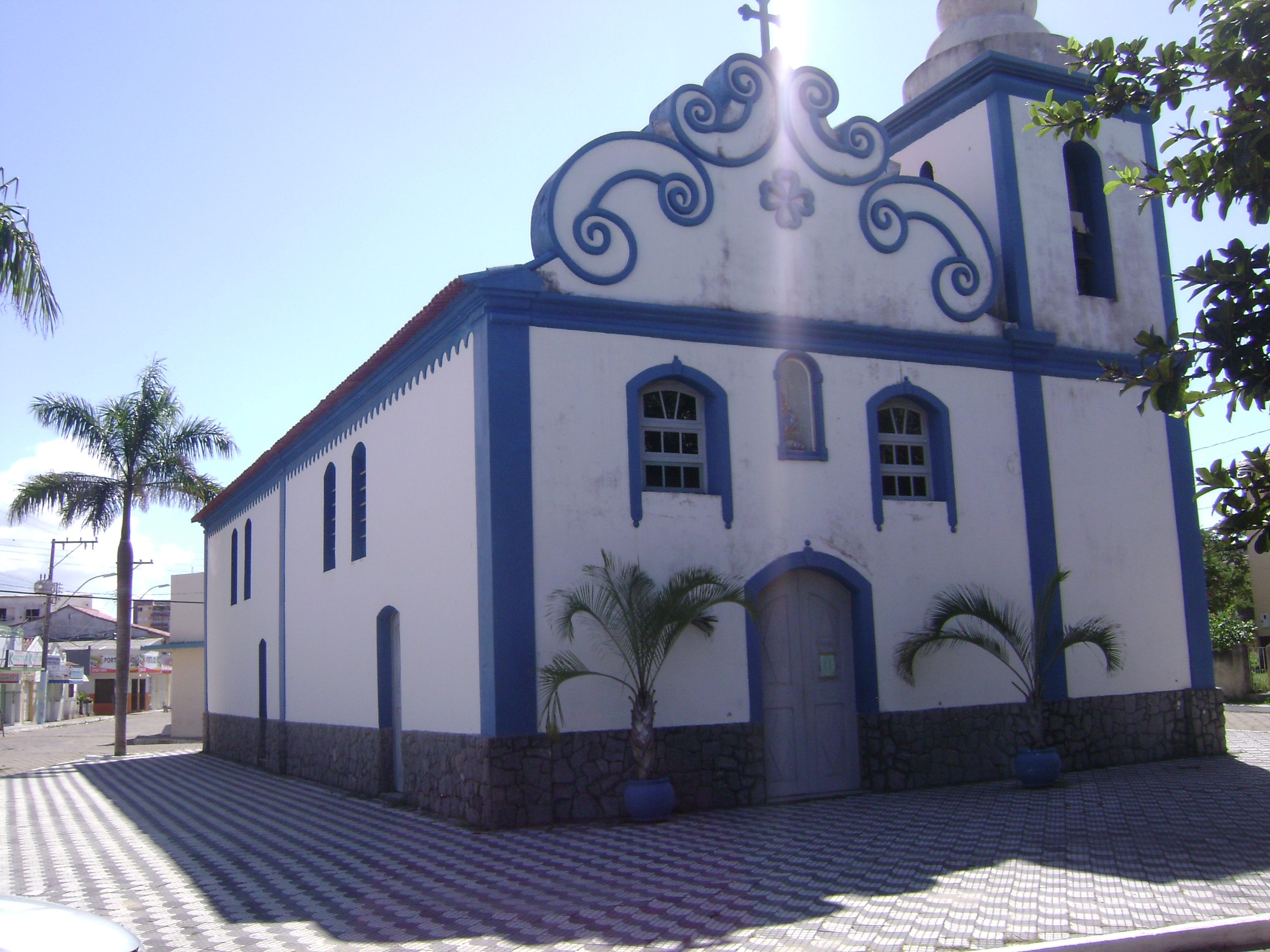 Igreja Matriz